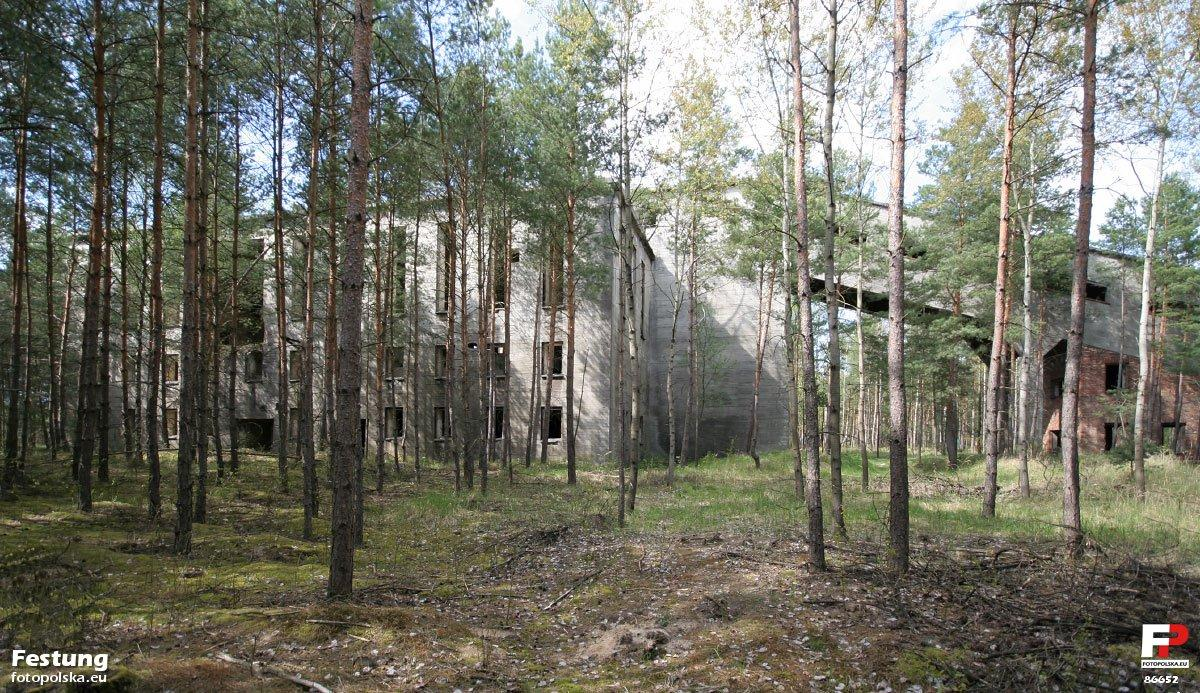 Na tym zdjęciu widać wielkość taśmowego transportera węgla krzystkowickiej elektrociepłowni.